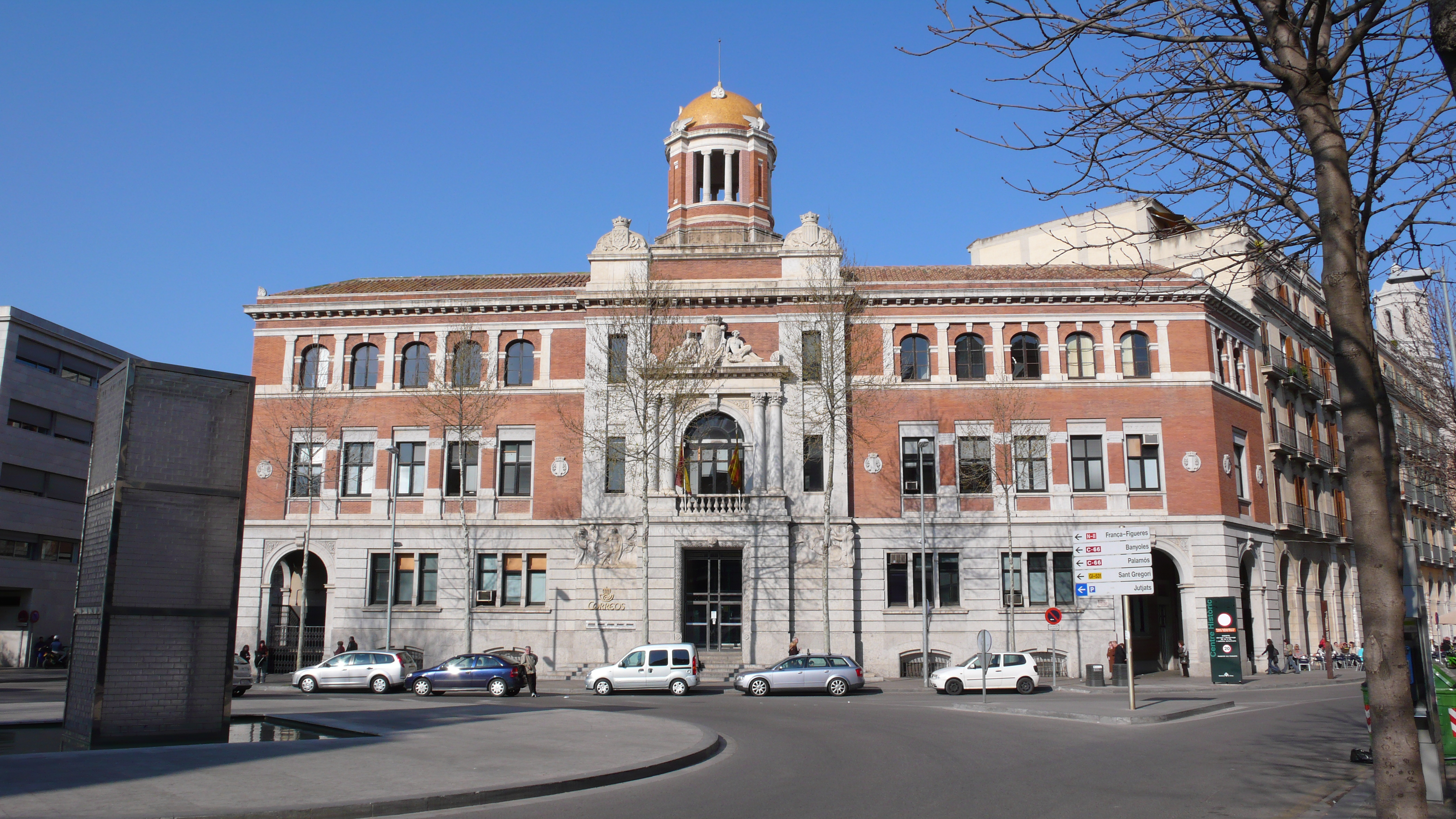 Edifici del servei postal a Girona